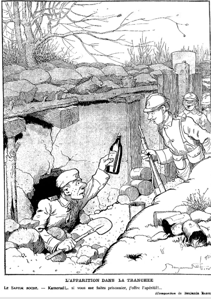 Journal Le Pêle-Mêle, 13 2 16, Boche se faisant prisonnier